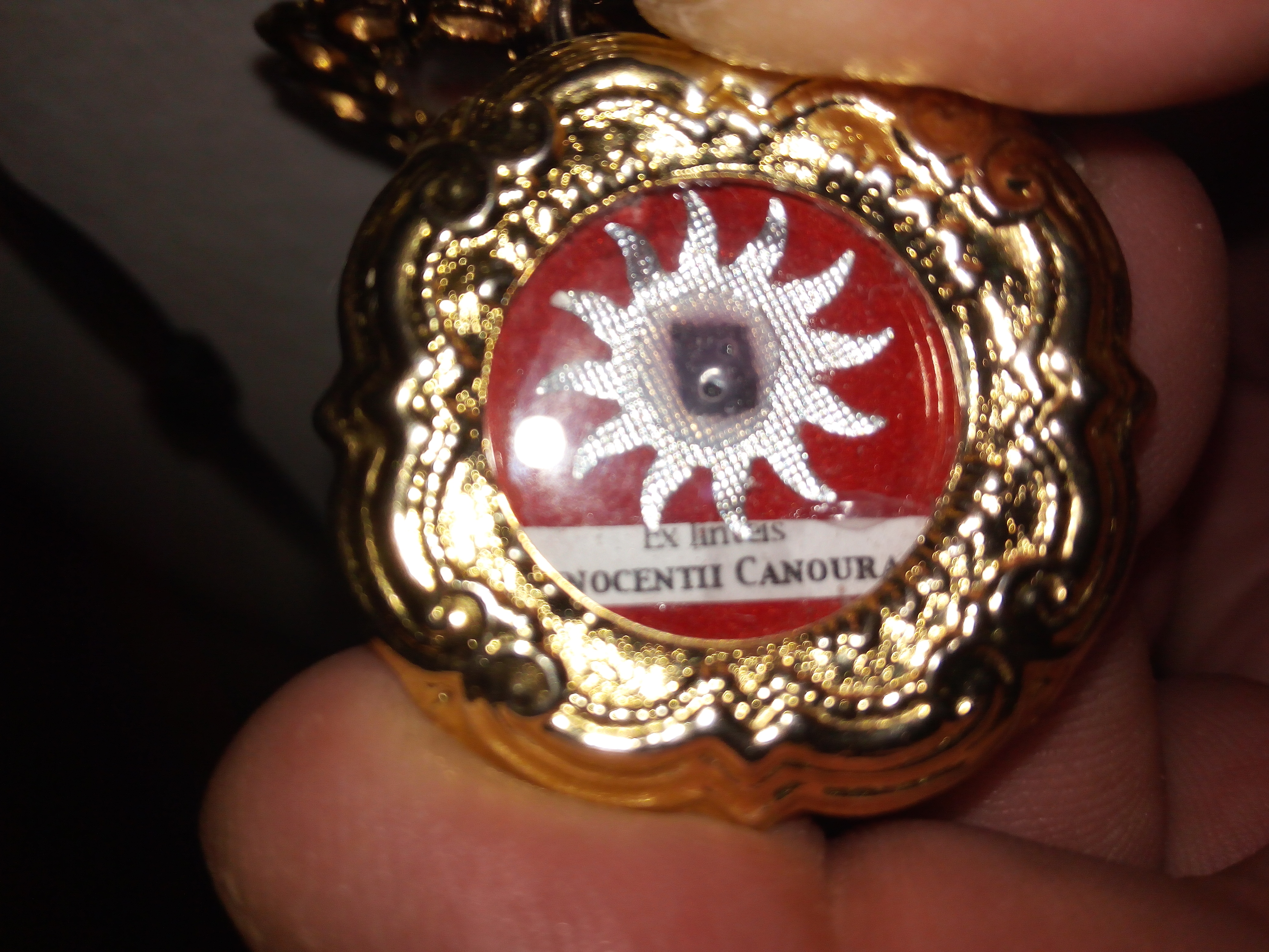 Reliquiario contenente frammento ex linteis Sancte Innocentii Canoura, Martire Passionista della Guerra Civile Spagnola. Un raro esempio di Santo Martire del quale non sono pervenute reliquie di I classe, essendo introvabile il Santo Corpo.